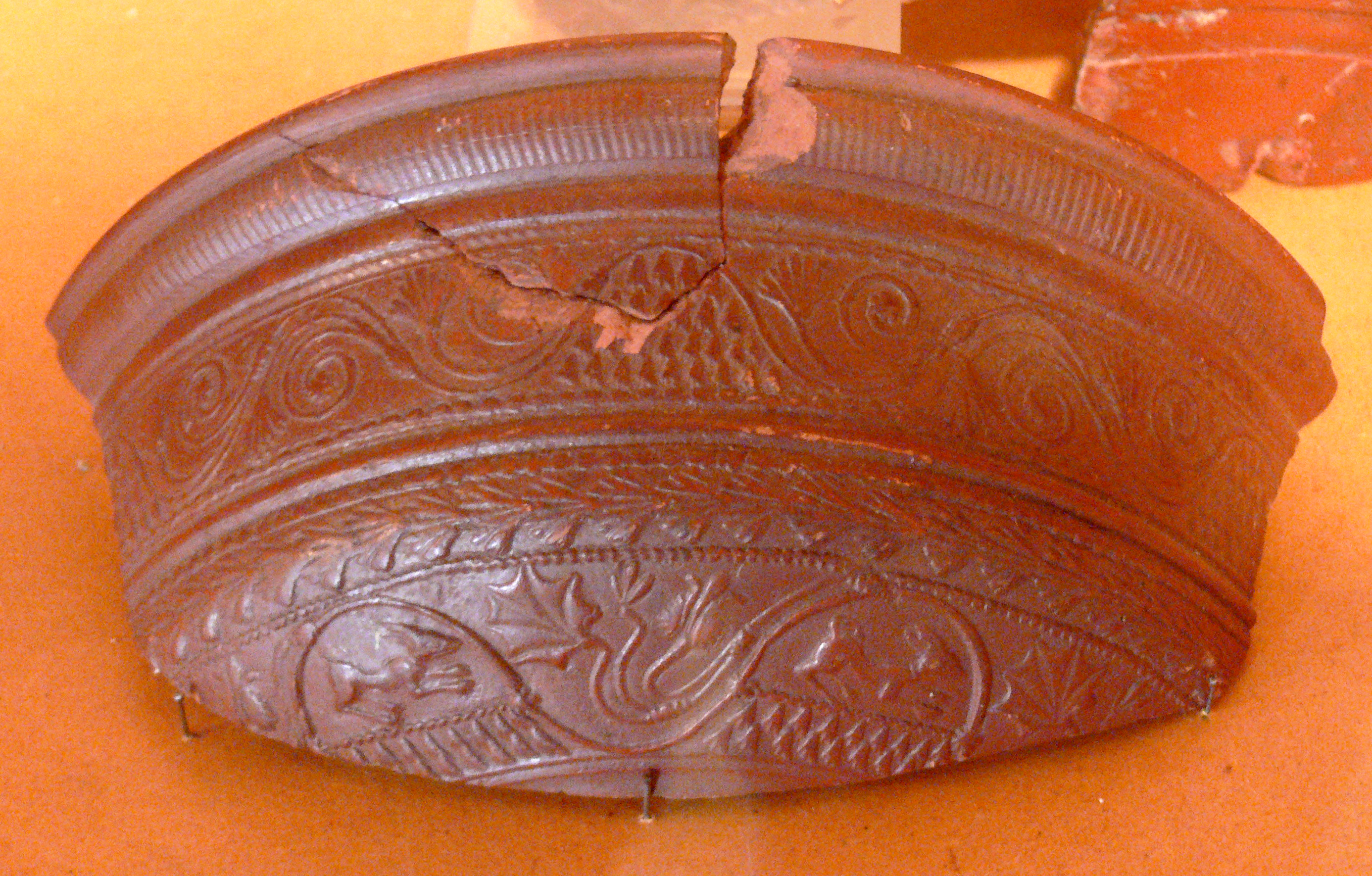 Fragment de céramique sigillée découverte à Luxeuil-les-Bains. Vesoul, musée Georges-Garret.